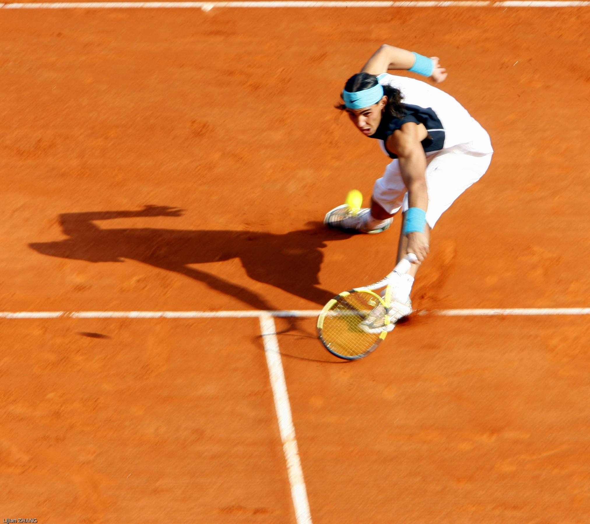 Rafael Nadal, Master Series Monte Carlo 2007